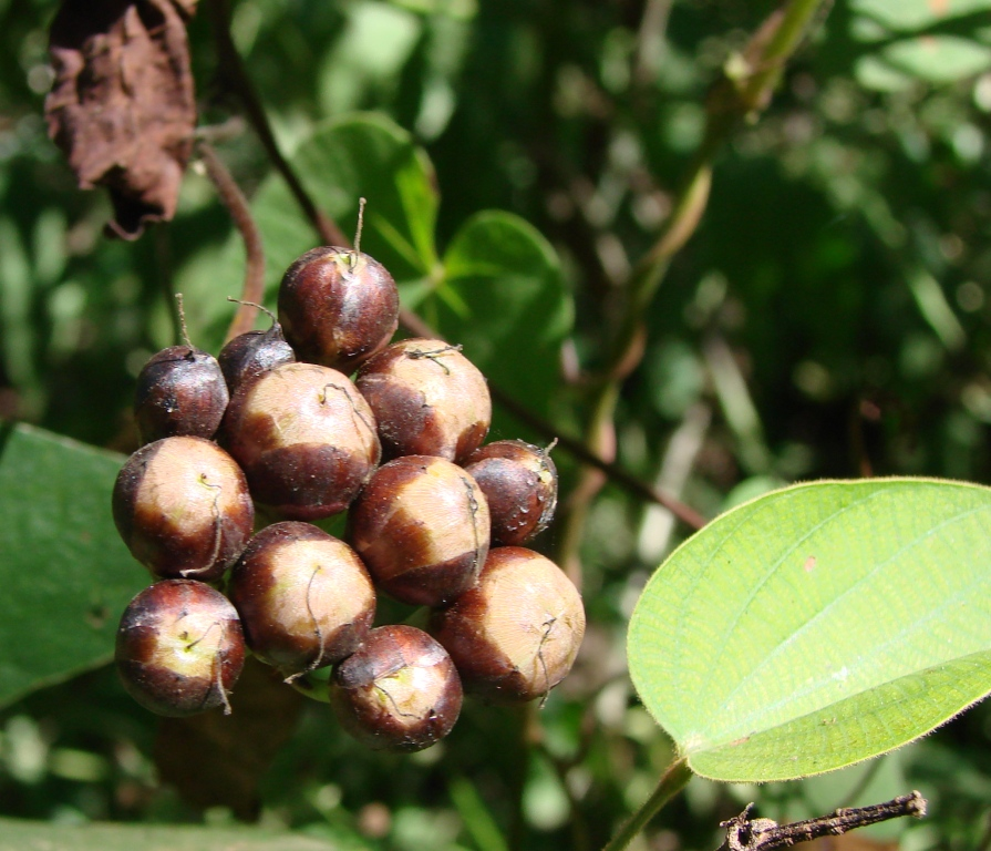 Merremia umbellata (L.) Hallier f. CONVOLVULACEAE Parque Nacional de Brasília - Brasília - Distrito Federal - Brasil.